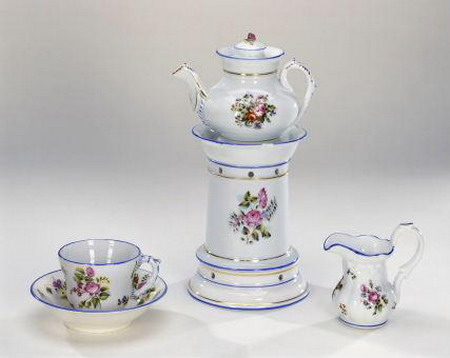 19 ст. Посуд для чаювання (порцелянова ваза, Волокитине)